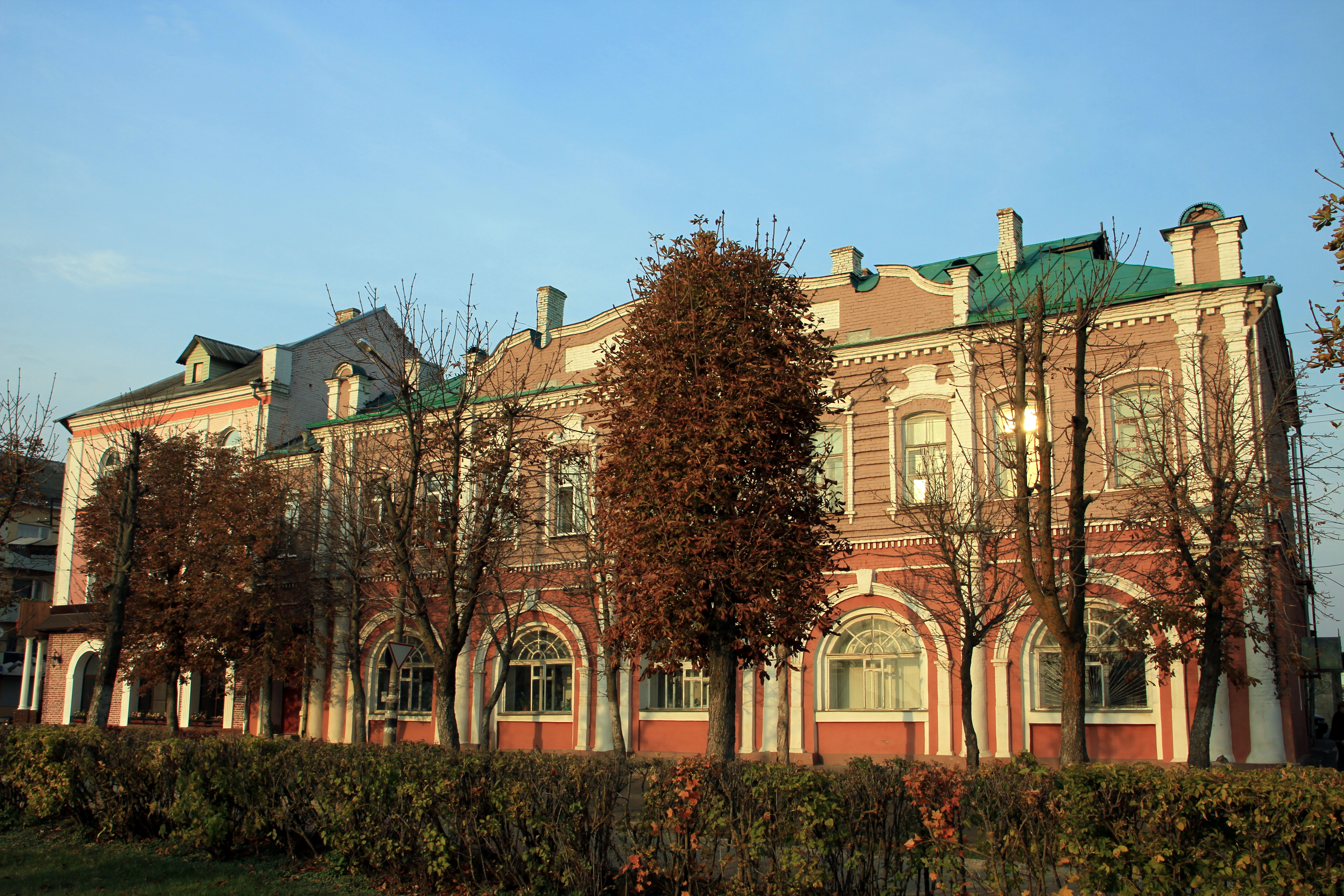 Дом дворянского собрания (Смоленская область, Рославль, улица Ленина, д. 1)